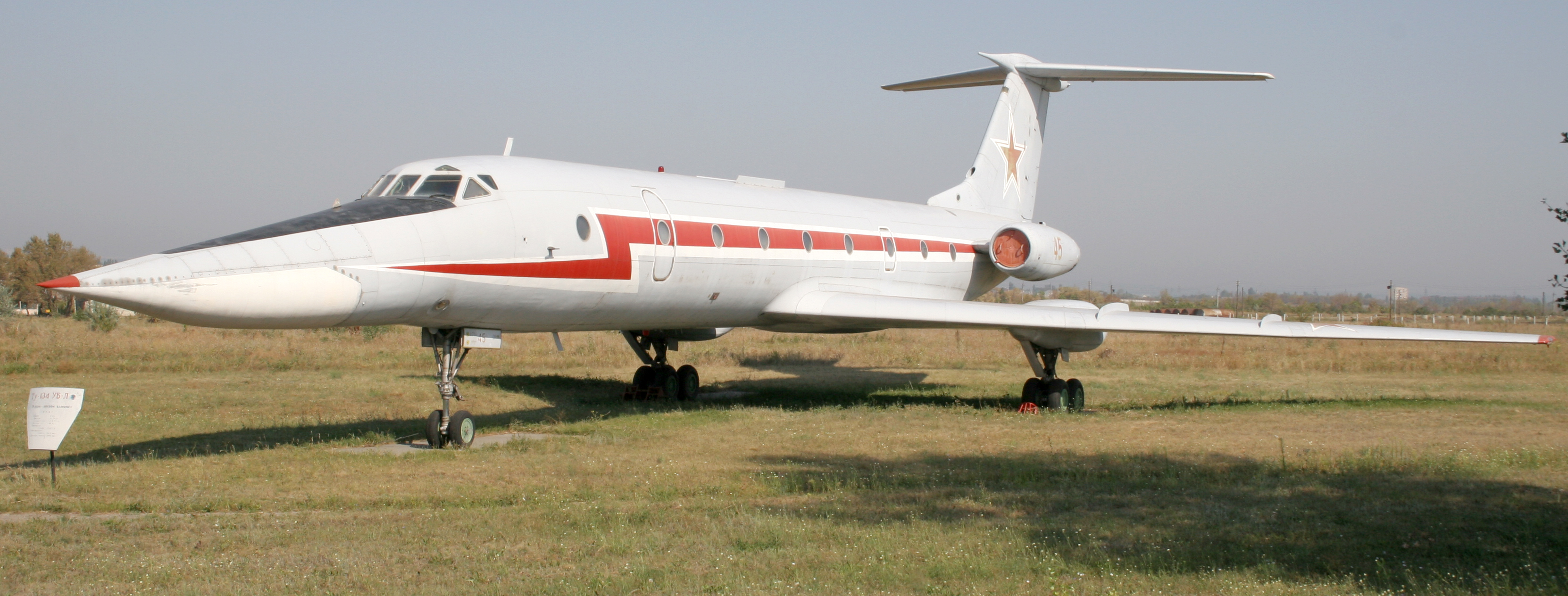 Самолёт Ту-134УБЛ. Экспонат музея дальней авиации на авиабазе Энгельс